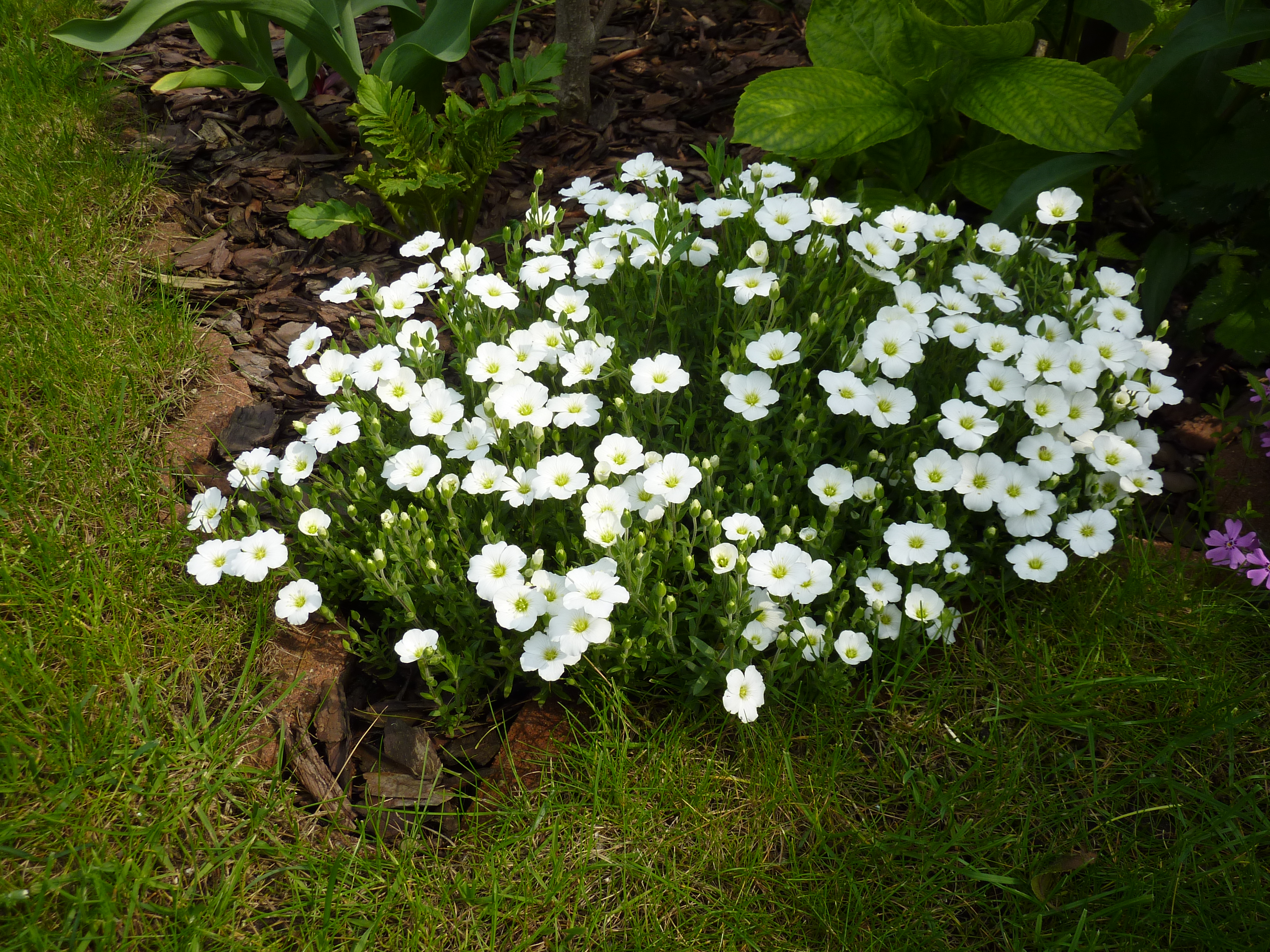 Kępa kwitnącego piaskowca (Arenaria hispanica flor?): koniec maja 2010, Zielona Góra